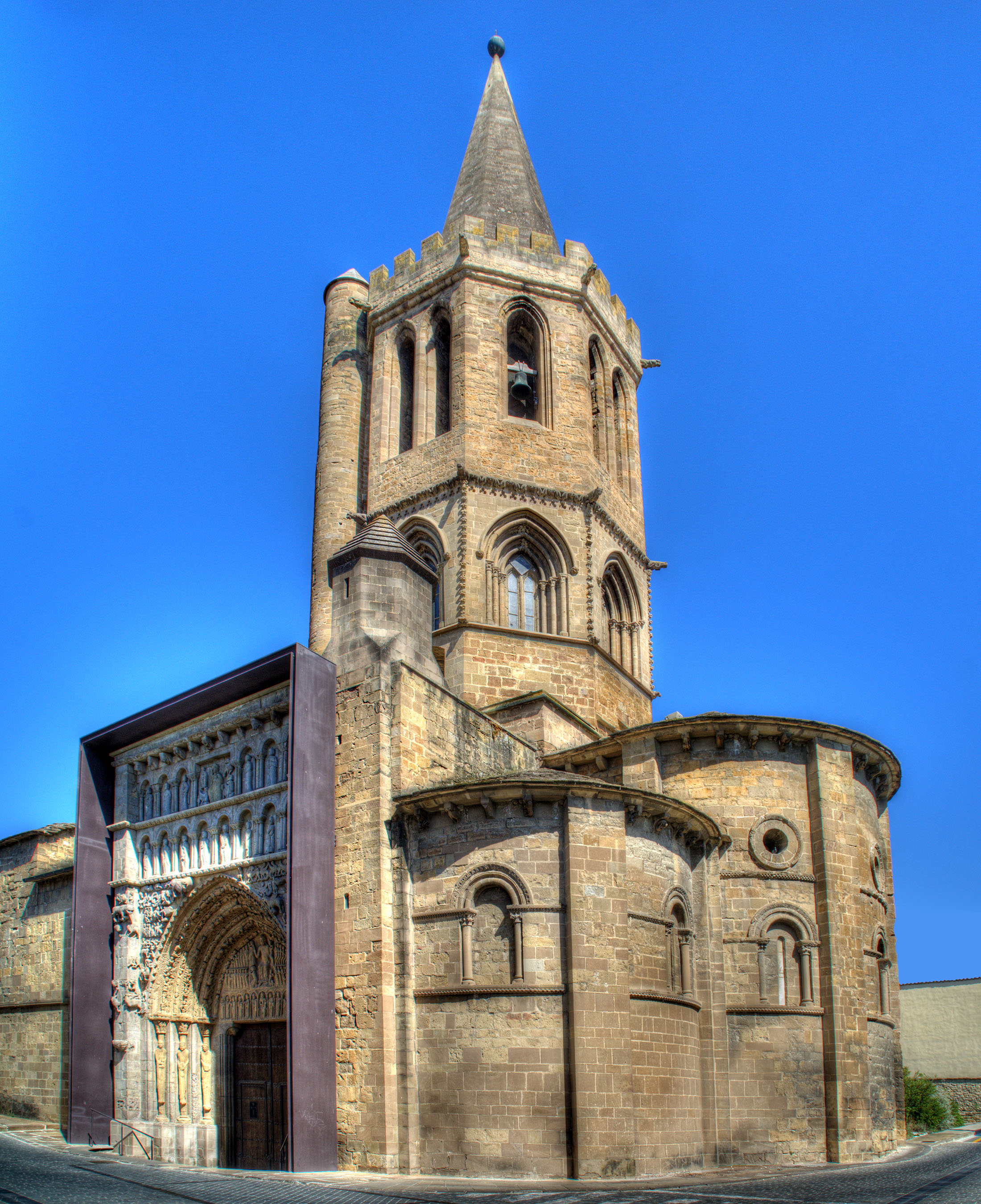 Edificada a primeros del siglo XII, muestra una gran portada románica obra de dos maestros llamados Leodegarius y Juan de la Peña.